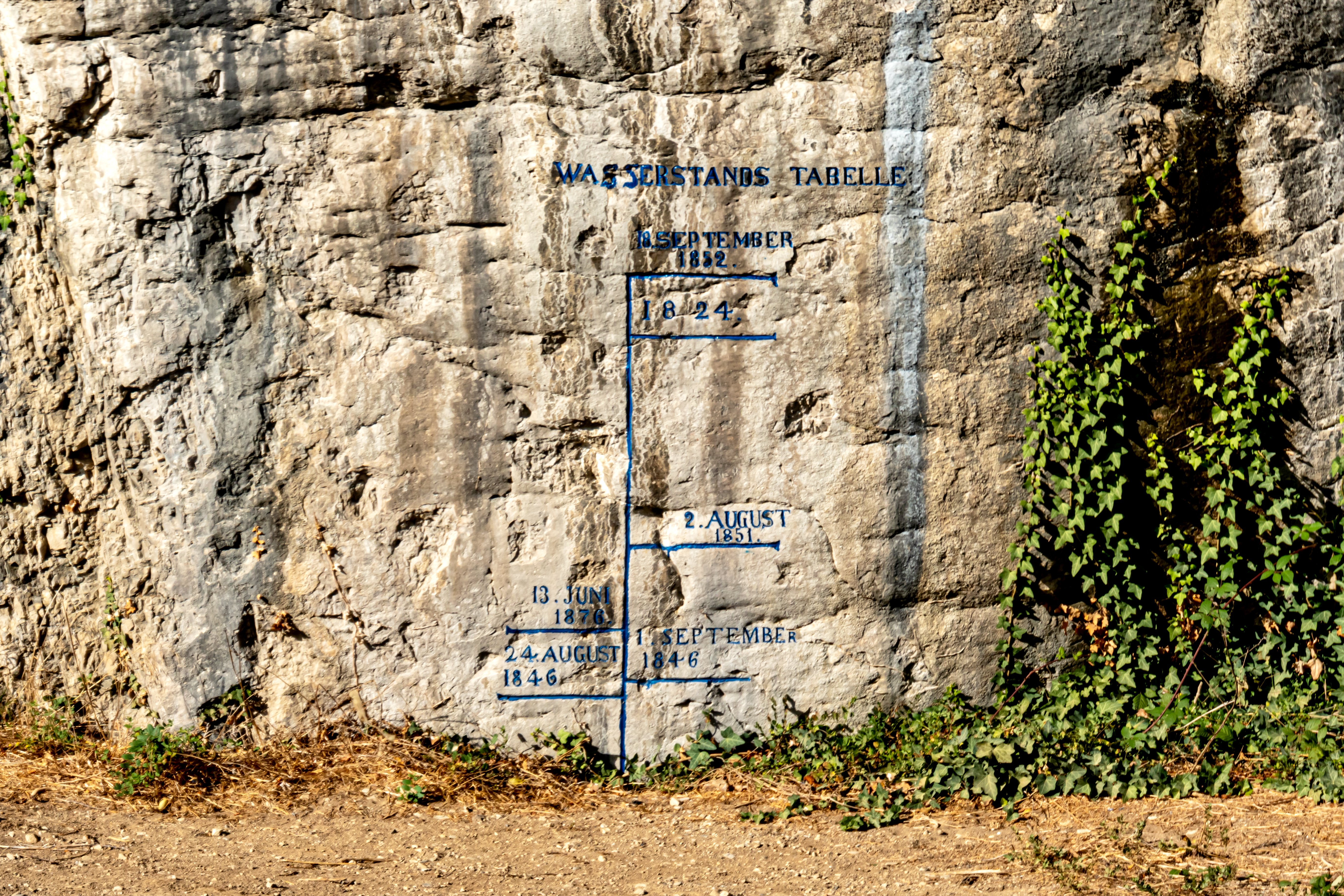 Bilder vom Isteiner Klotz am 20. 10. 2019